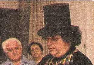 Eduardo Bergara Leumann